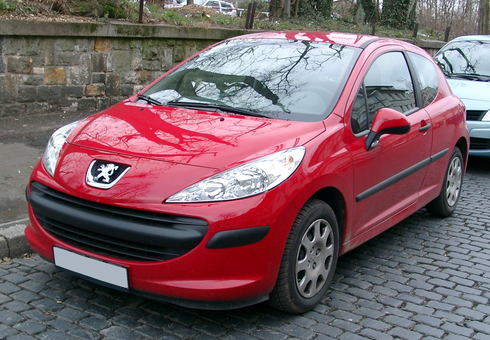 Peugeot 207